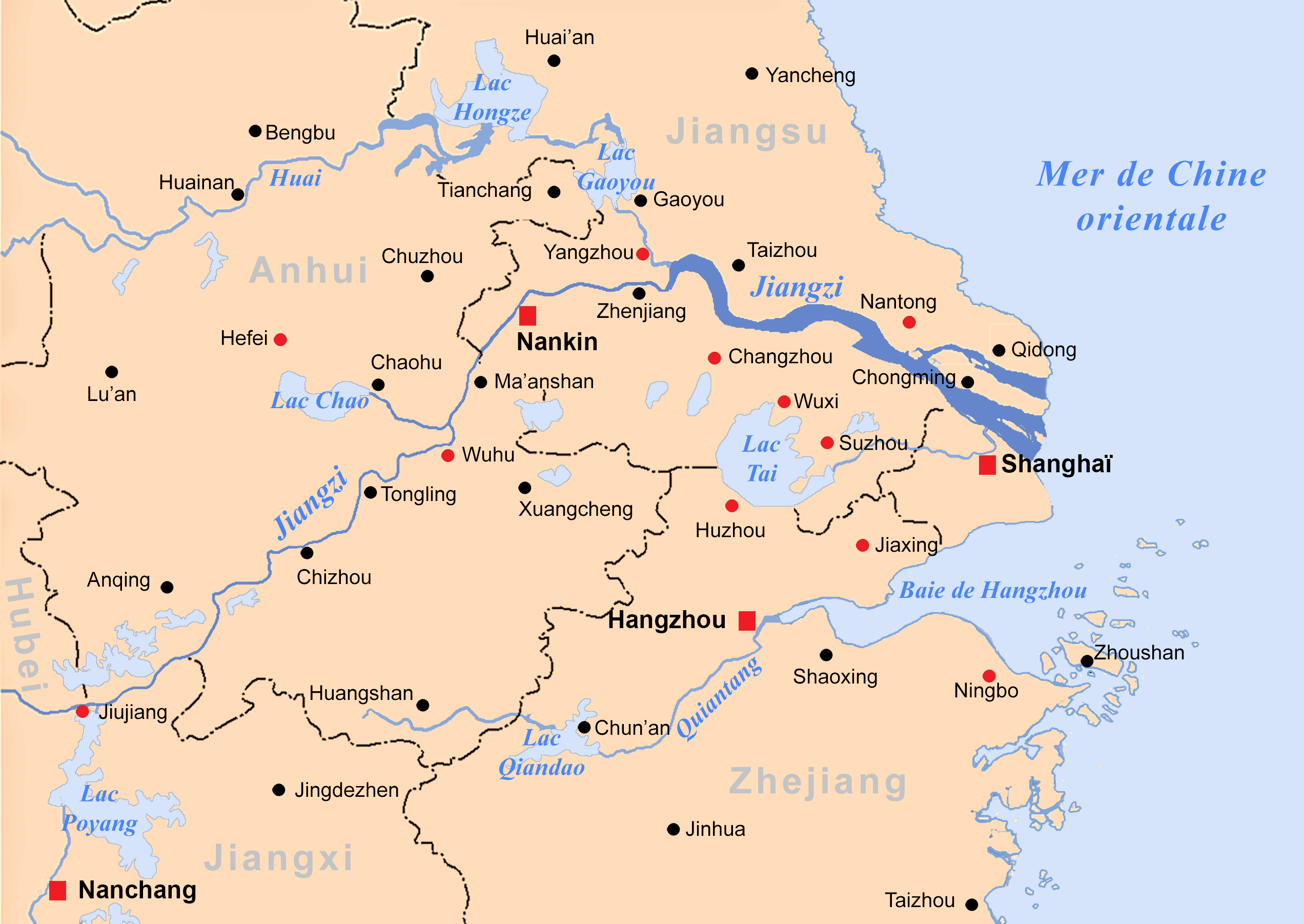 Carte du cours inférieur du Yangzi Jiang. Traduction carte citée.